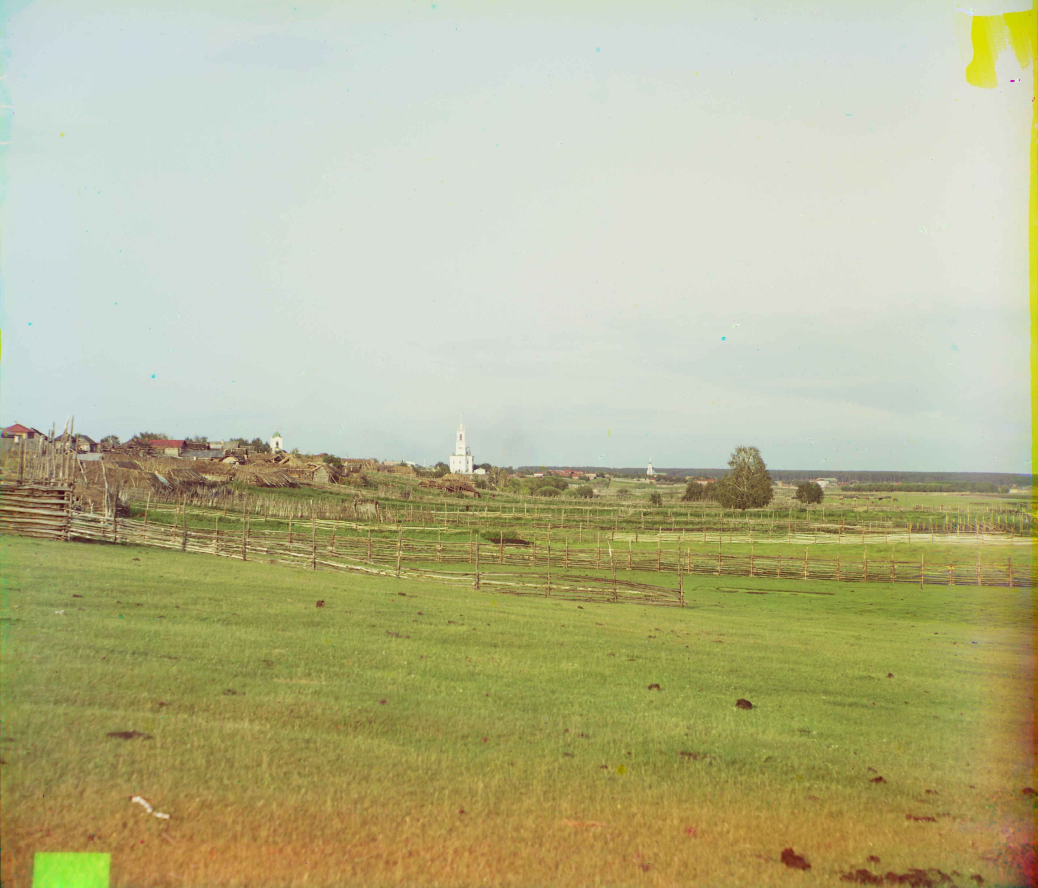 С.М.Прокудин-Горский. Общий вид на г. Камышлов с запада. 1912 год